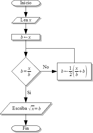 Diagrama de flujo del algoritmo babilónico para obtener una raíz cuadrada